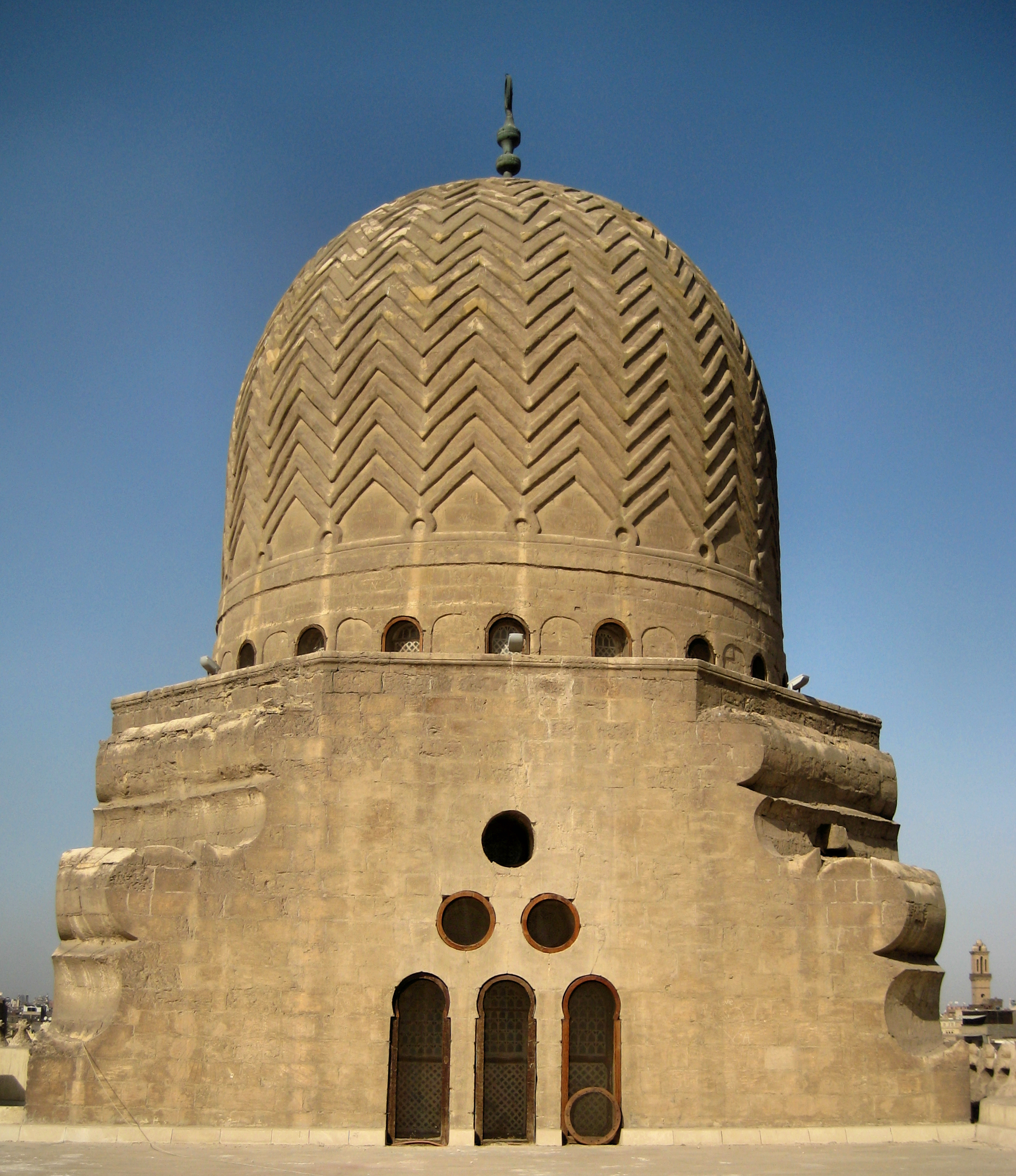 Al-Mu'ayyad